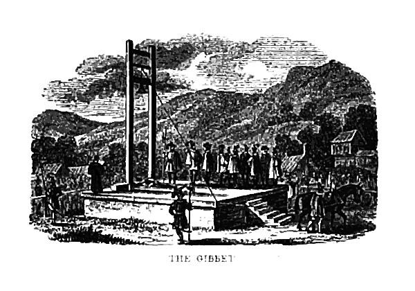 Le Gibet d'Halifax, exemple d'instrument à décapitation.